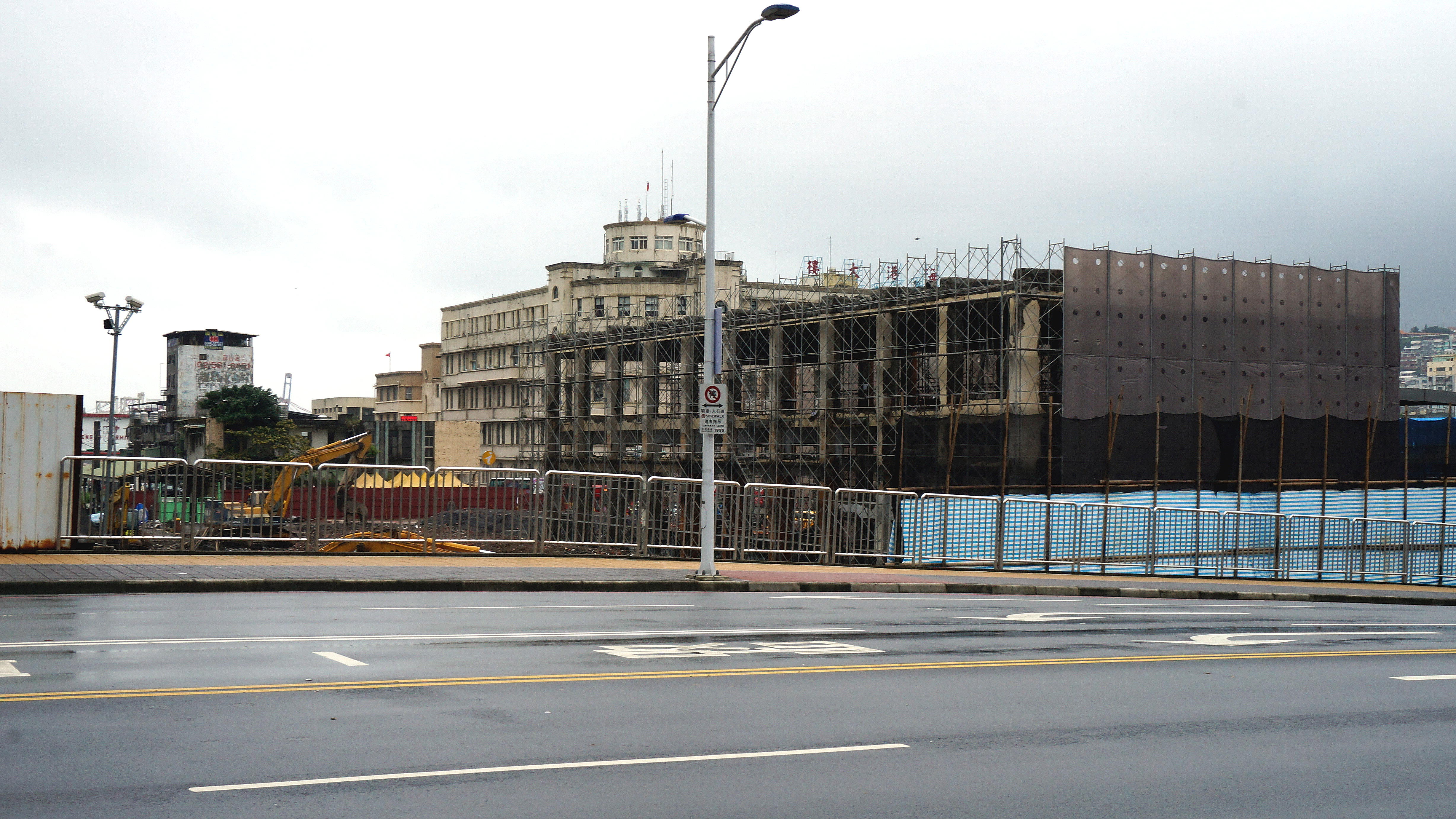 臺灣鐵路管理局基隆車站第四代車站拆除工程。